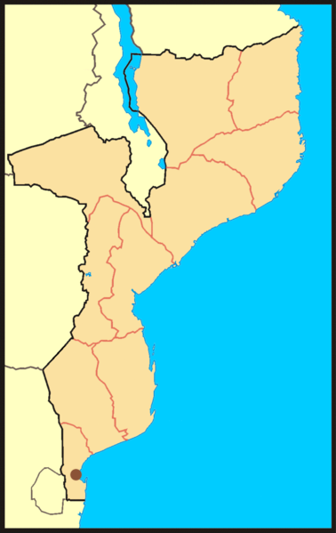 Mapa ilustrativo - Províncias de Moçambique (versão simples)